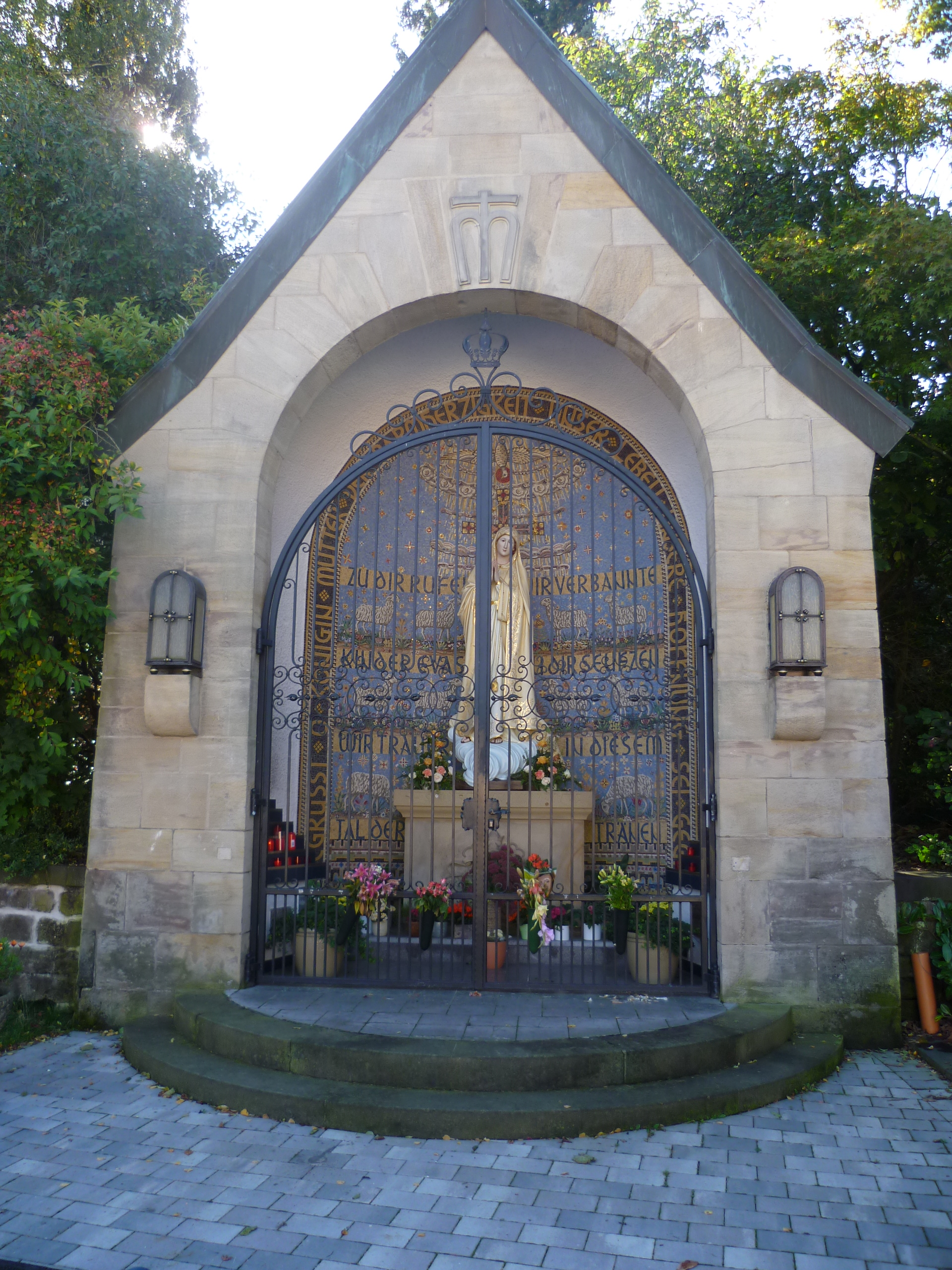 Marienkapelle an der Katholischen Pfarrkirche Heilige Dreifaltigkeit in Wiebelskirchen